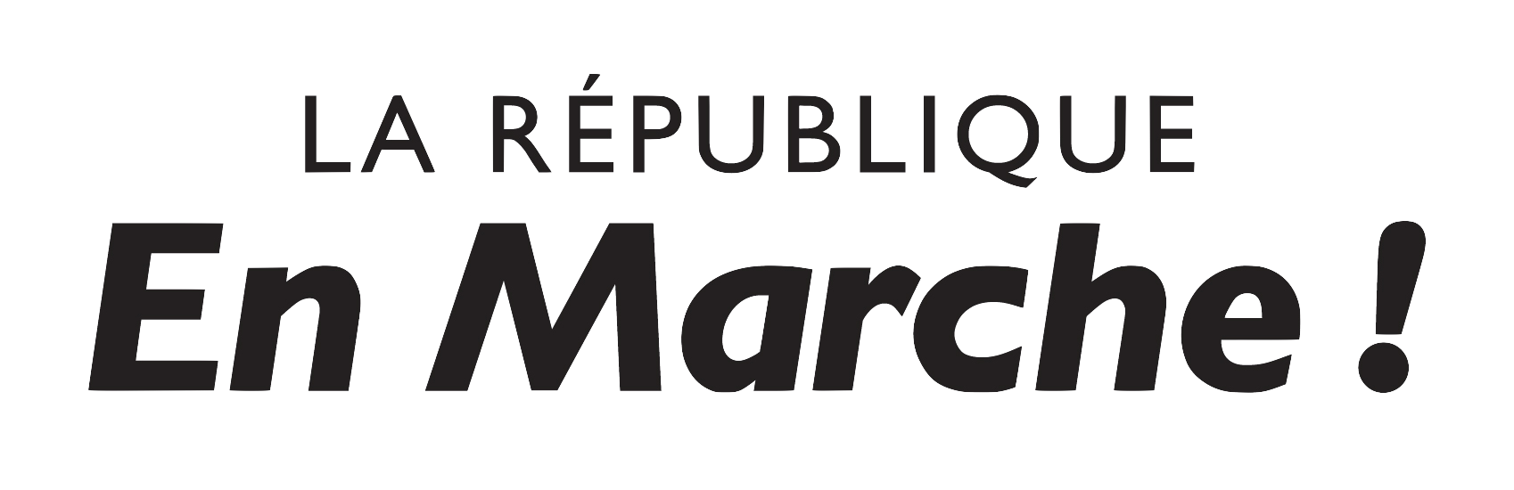 Logo du parti politique français La République en marche !